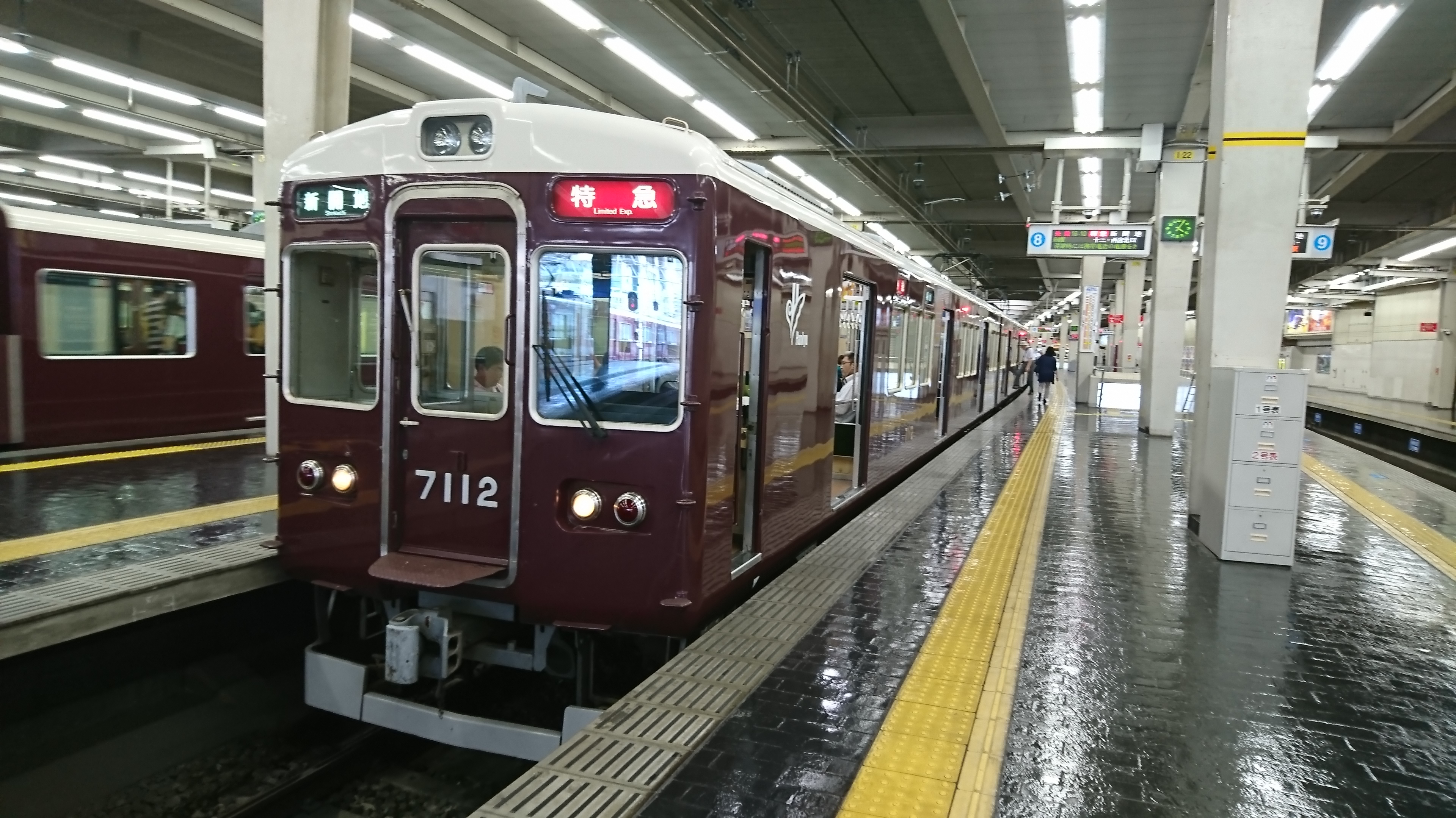 阪急7000系7012F